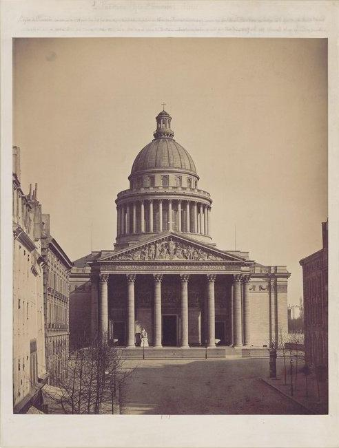 Gustave Le Gray (Français, 1820-1884) : Vue du Panthéon de Paris de la rue Soufflot, 1859